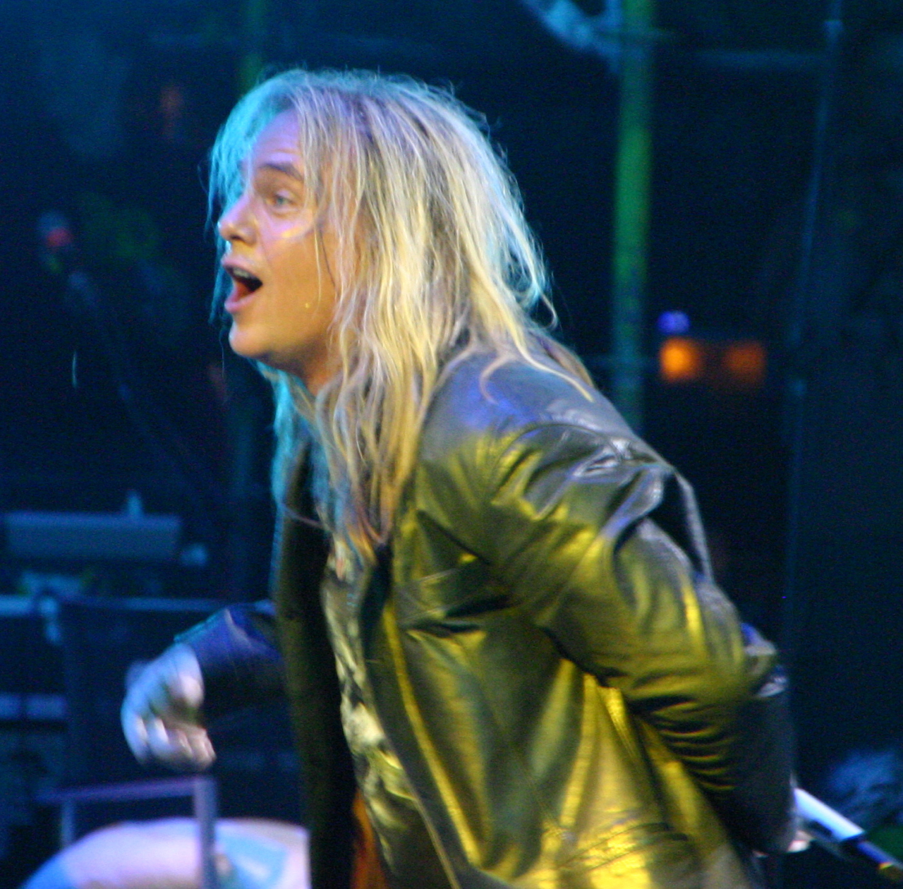 Andreas Deris na Przystanek Woodstock w 2011 r.